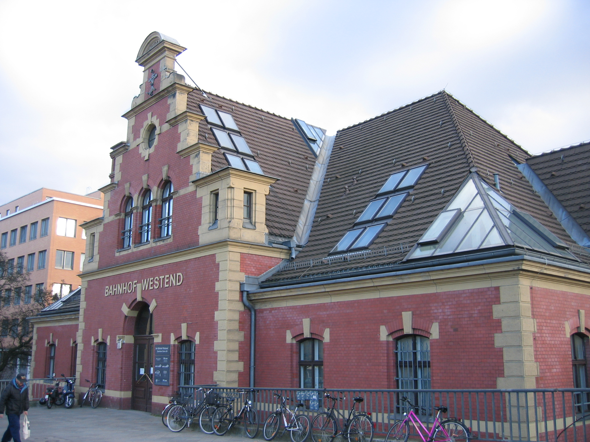 S-Bahnhof Berlin-Westend